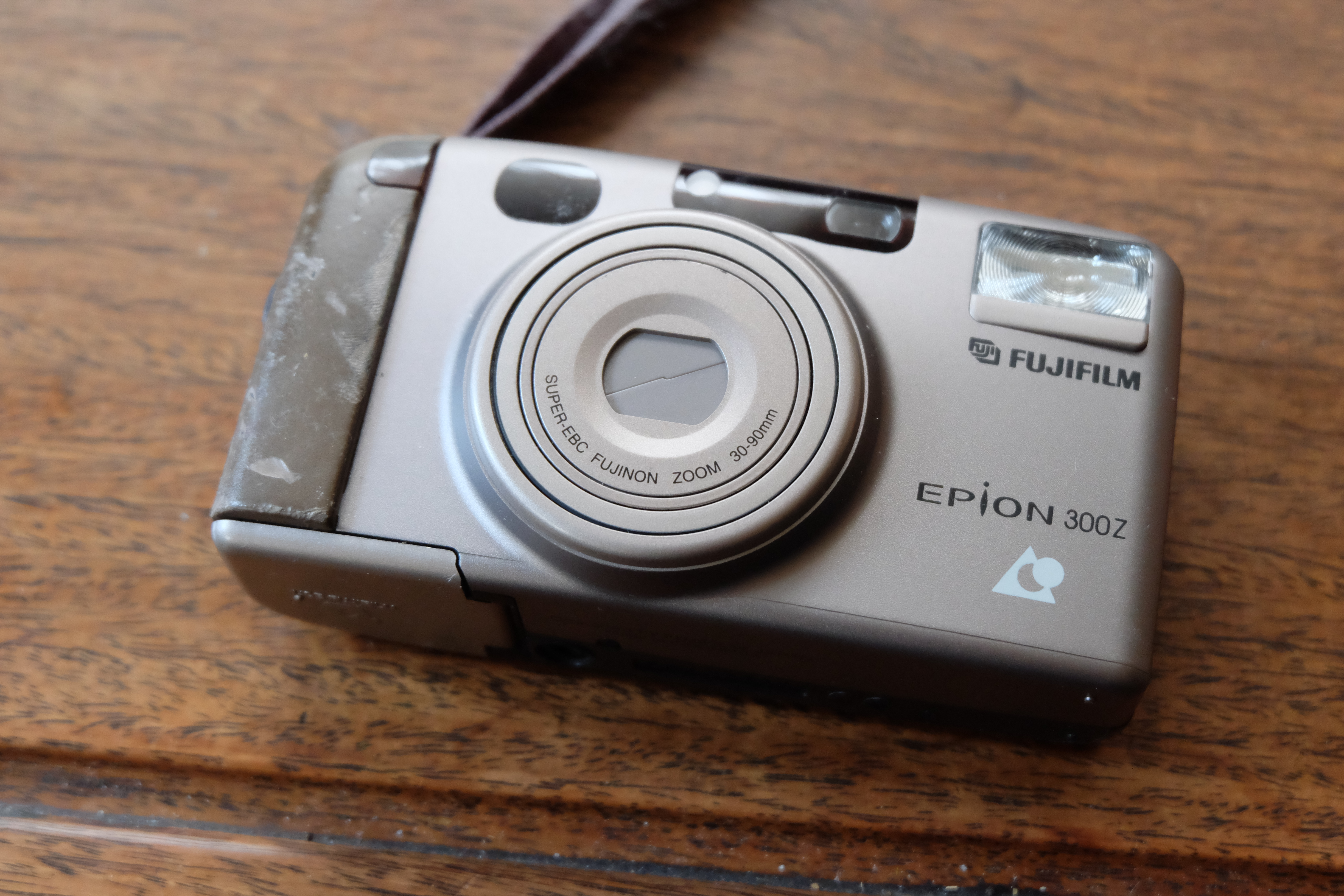 富士フイルム EPION 300Z APSフイルムカメラ